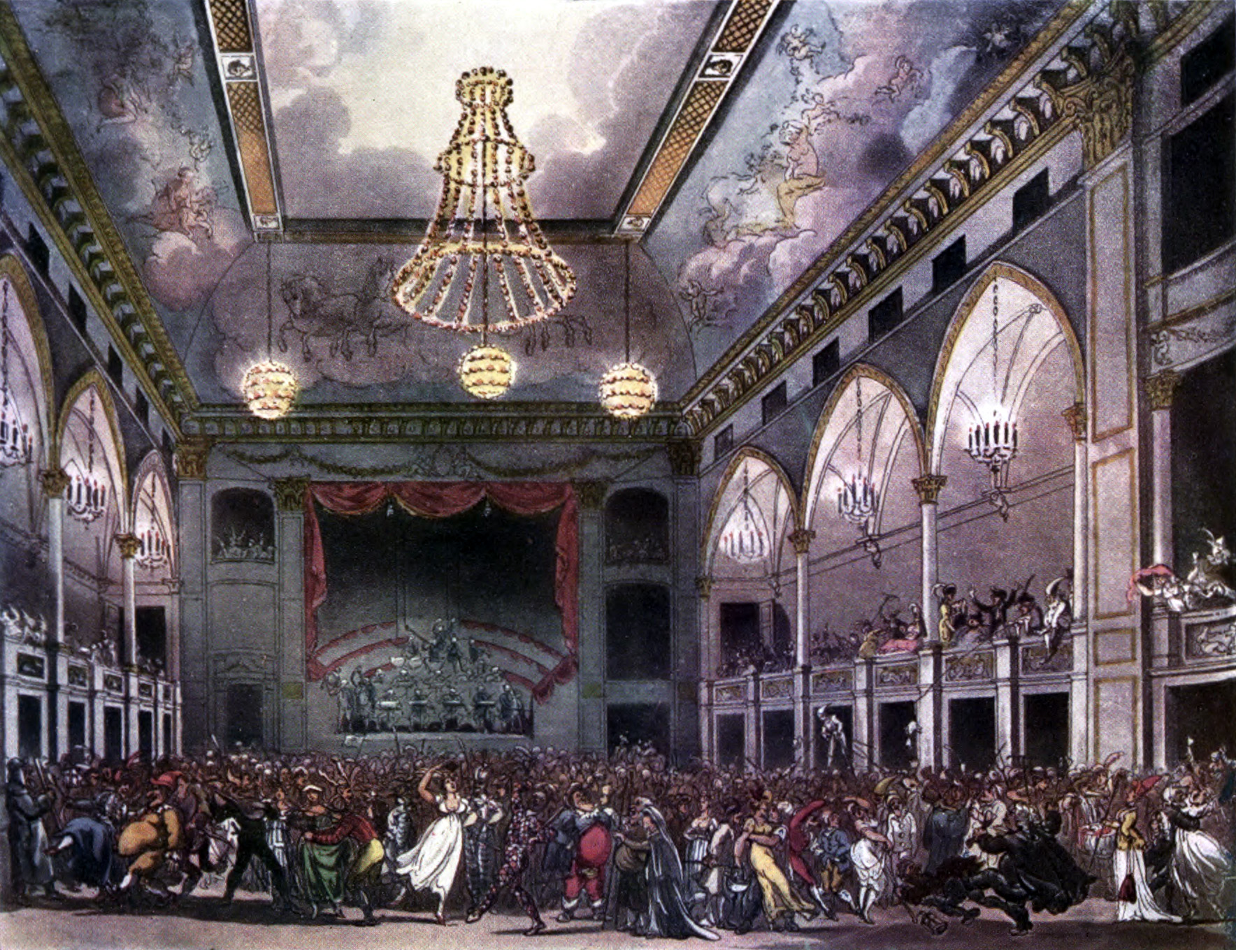 Pantheon Masquerade